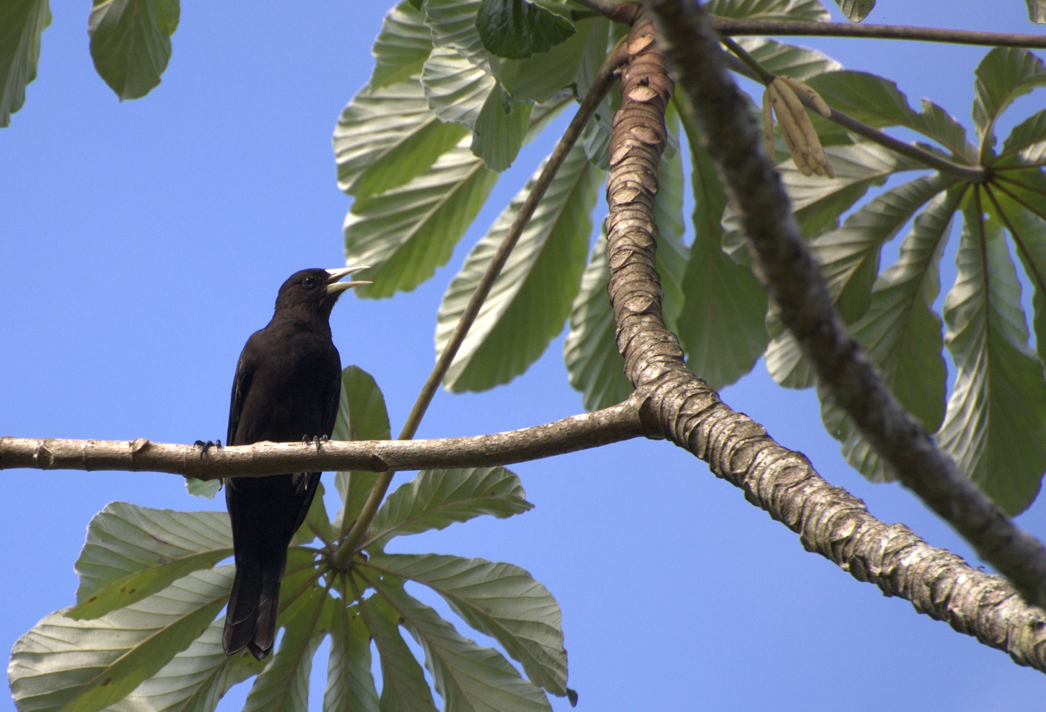 Vale do Ribeira - Registro-SP